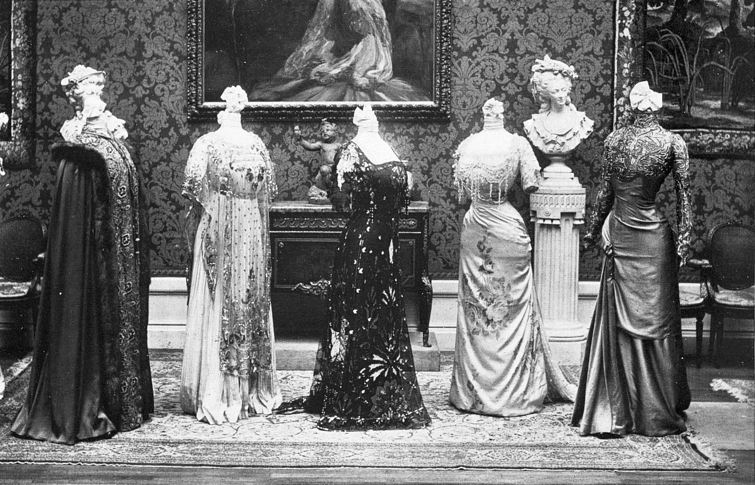 Exposition à l'Hôtel des Modes. Photograph in Les Modes : Revue mensuelle illustrée des arts décoratifs appliqués à la femme.